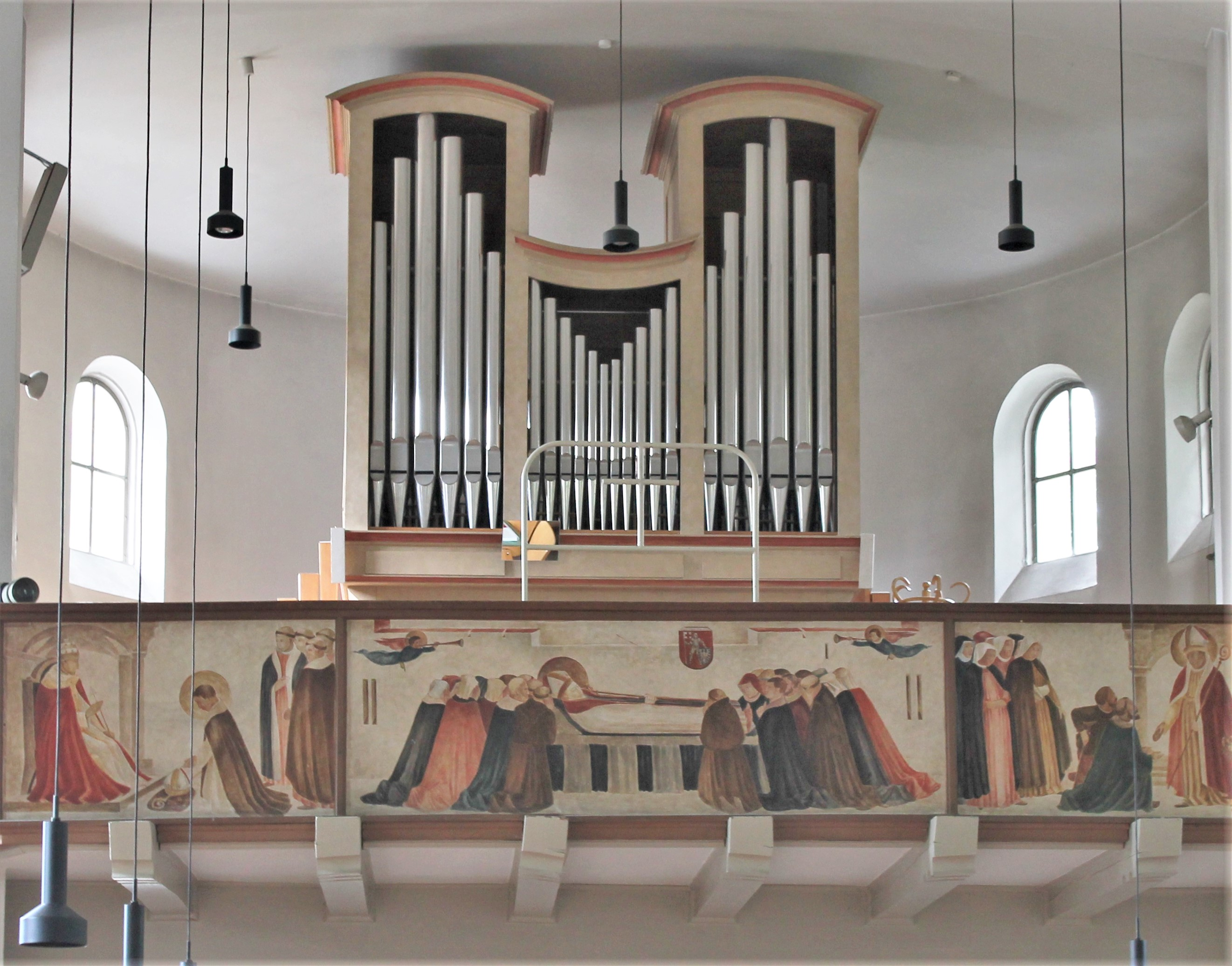 Orgel von St. Otto in Ottobrunn (1993, H. v. Kerssenbrock, II/14)